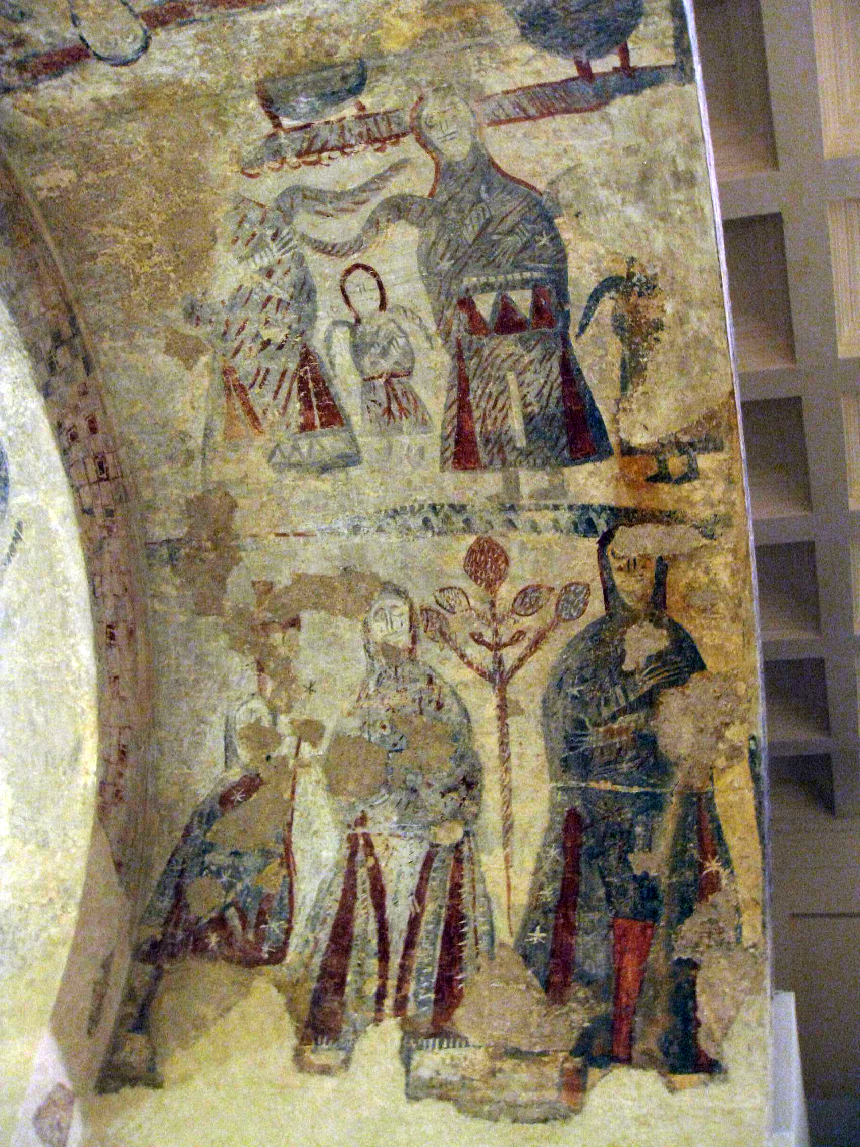 Palau Nacional (Barcelona)